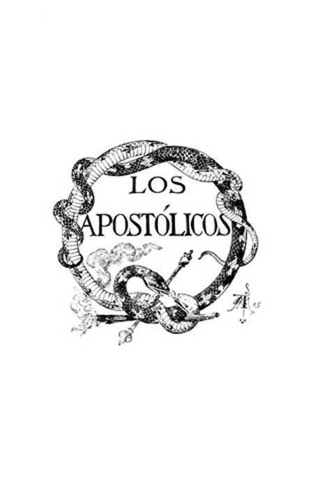 Portada del episodio nacional "Los Apostólicos" de Benito Pérez Galdós. Obra ilustrada por Mélida, Ferrant, Beruete, Ferriz, Gómez Soler, Alcázar, Hernández Nájera y Mestres